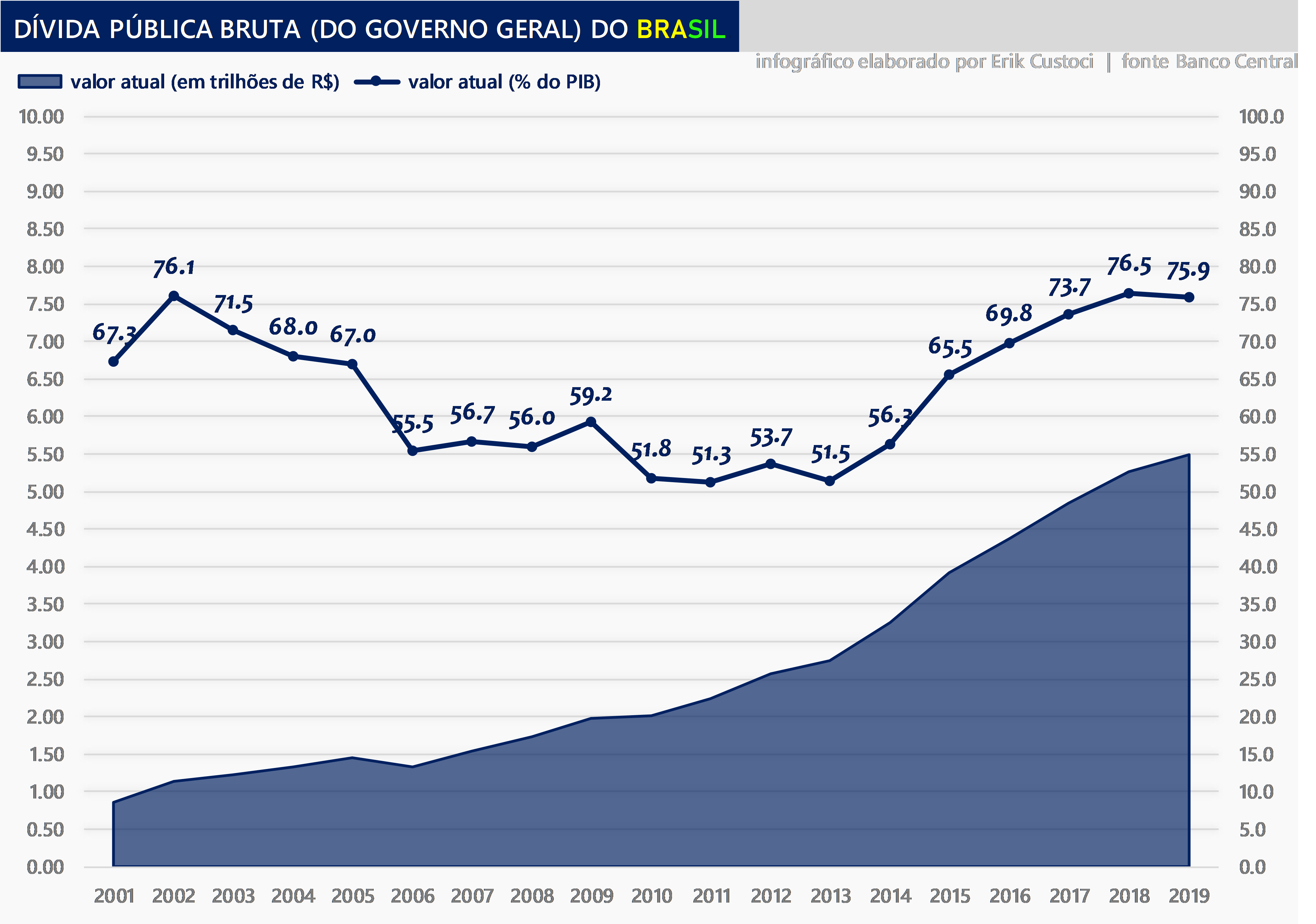 Dívida pública bruta (do governo geral) brasileira entre 2001 e 2019.